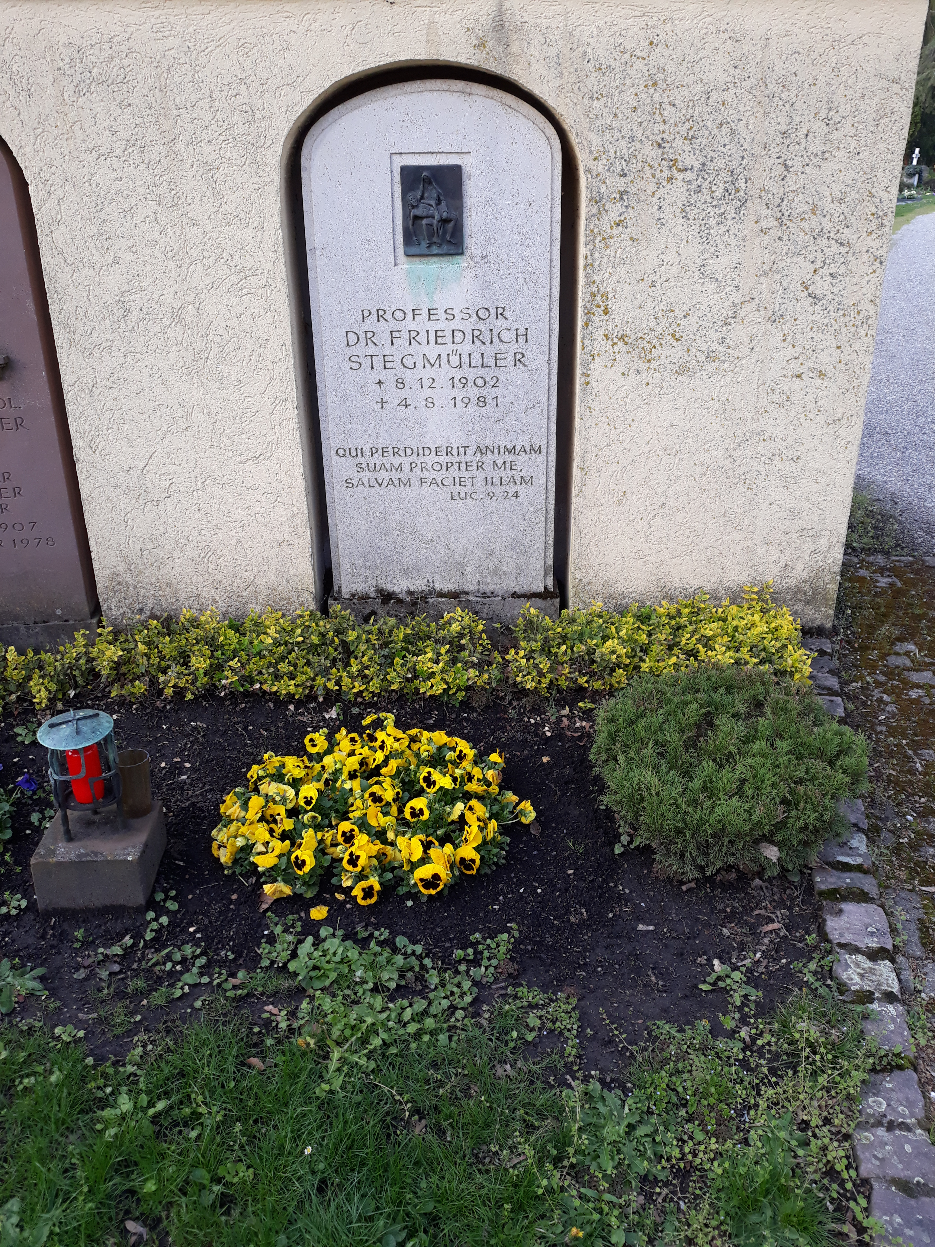 Das Grab des Priesters und Theologieprofessors Friedrich Stegmüller auf dem Hauptfriedhof Freiburg.